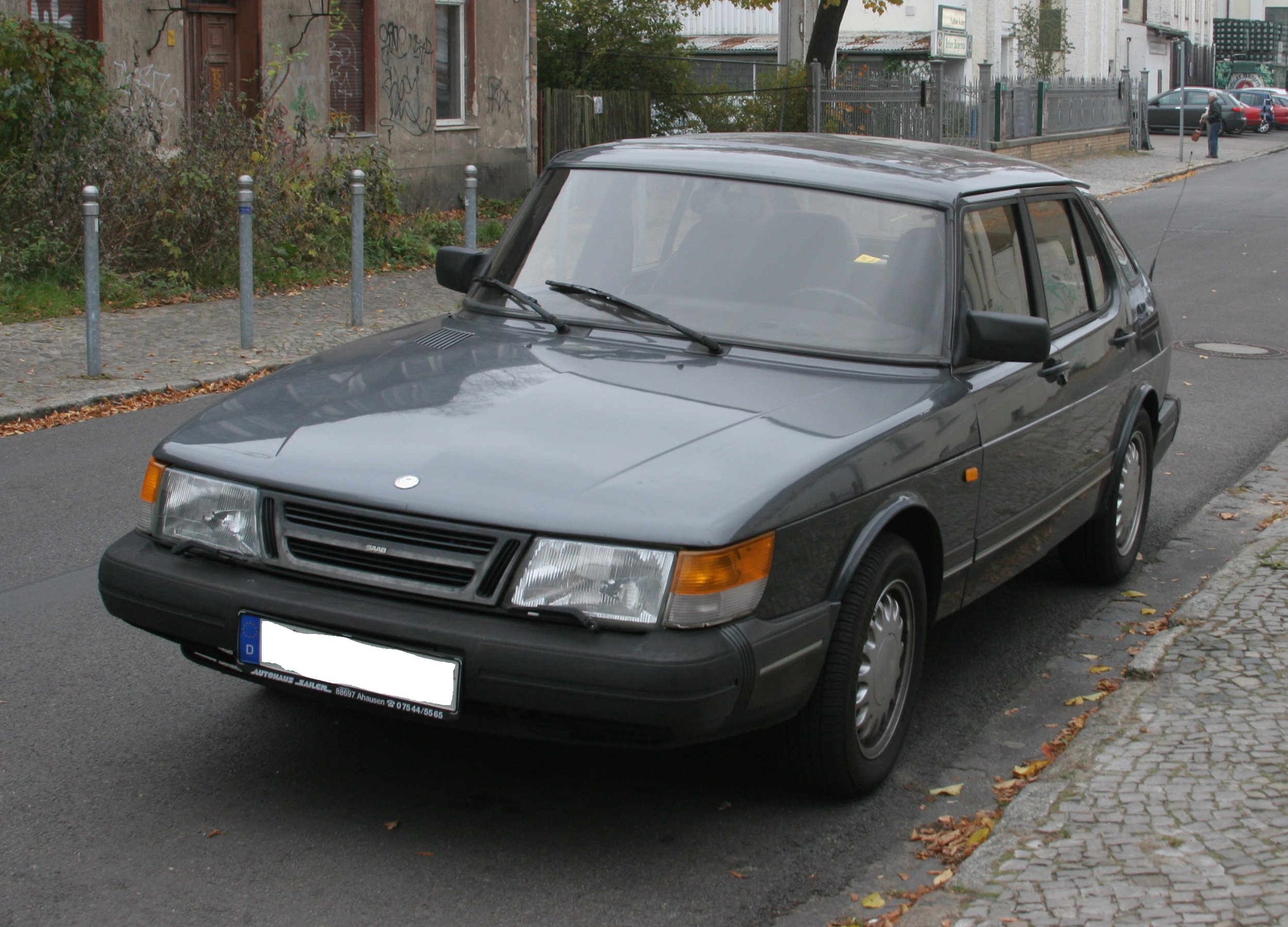 Saab 900i 16v